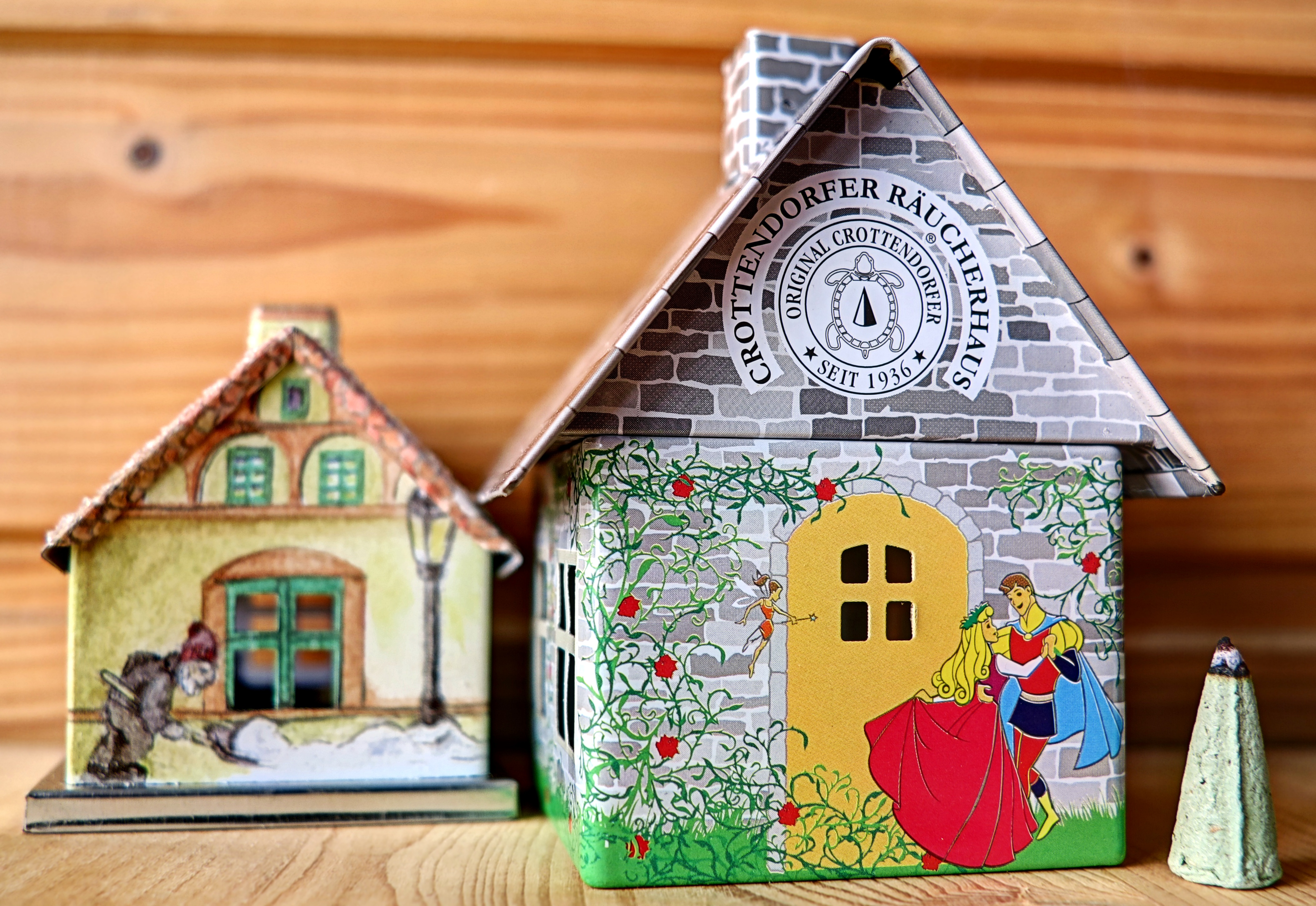 Zwei Räucherhäuschen mit Räucherkerzen